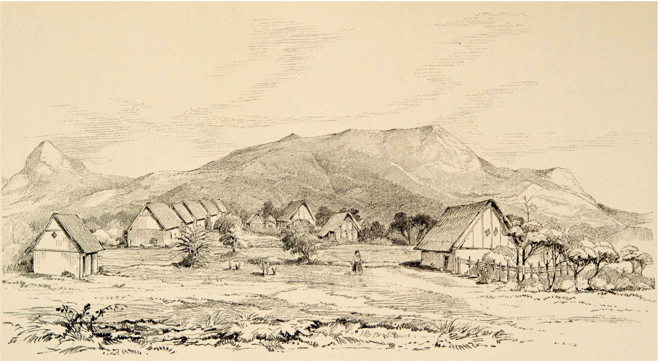 Tarapoto, con el Monte Guayrapurima, donde Spruce recolectaba plantas al noreste de la ciudad, en el fondo. Dibujado por Spruce en 1856. Spruce 1908 , II: 41, 1970. En su viaje de Tarapoto, descendió del monte Guayrapurima a un arroyo claro, Caraná, que tenía "el pedazo de helecho más rico que había visto en el mundo" ( Spruce 1908 , II: 92).